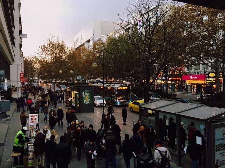 Atatürk Bulvarı üzerinde Kızılay Meydanı, Güvenpark ve Kızılay AVM istikametinde.